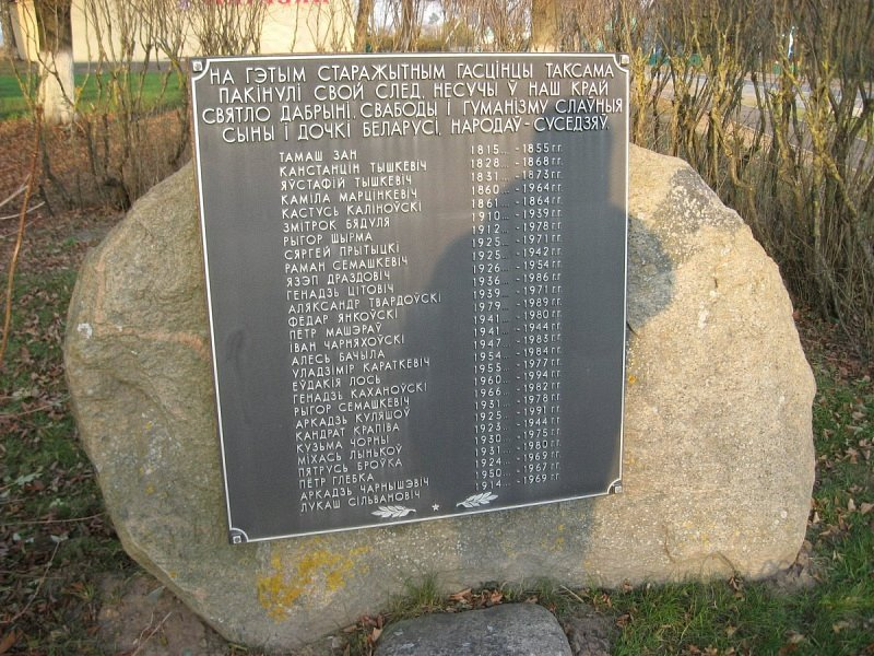 Мясата. Помнік Віленскаму тракту